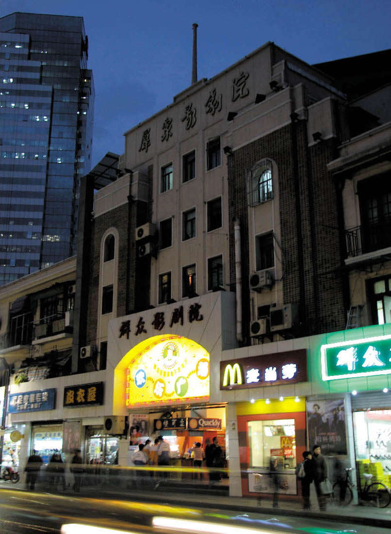 群众电影院